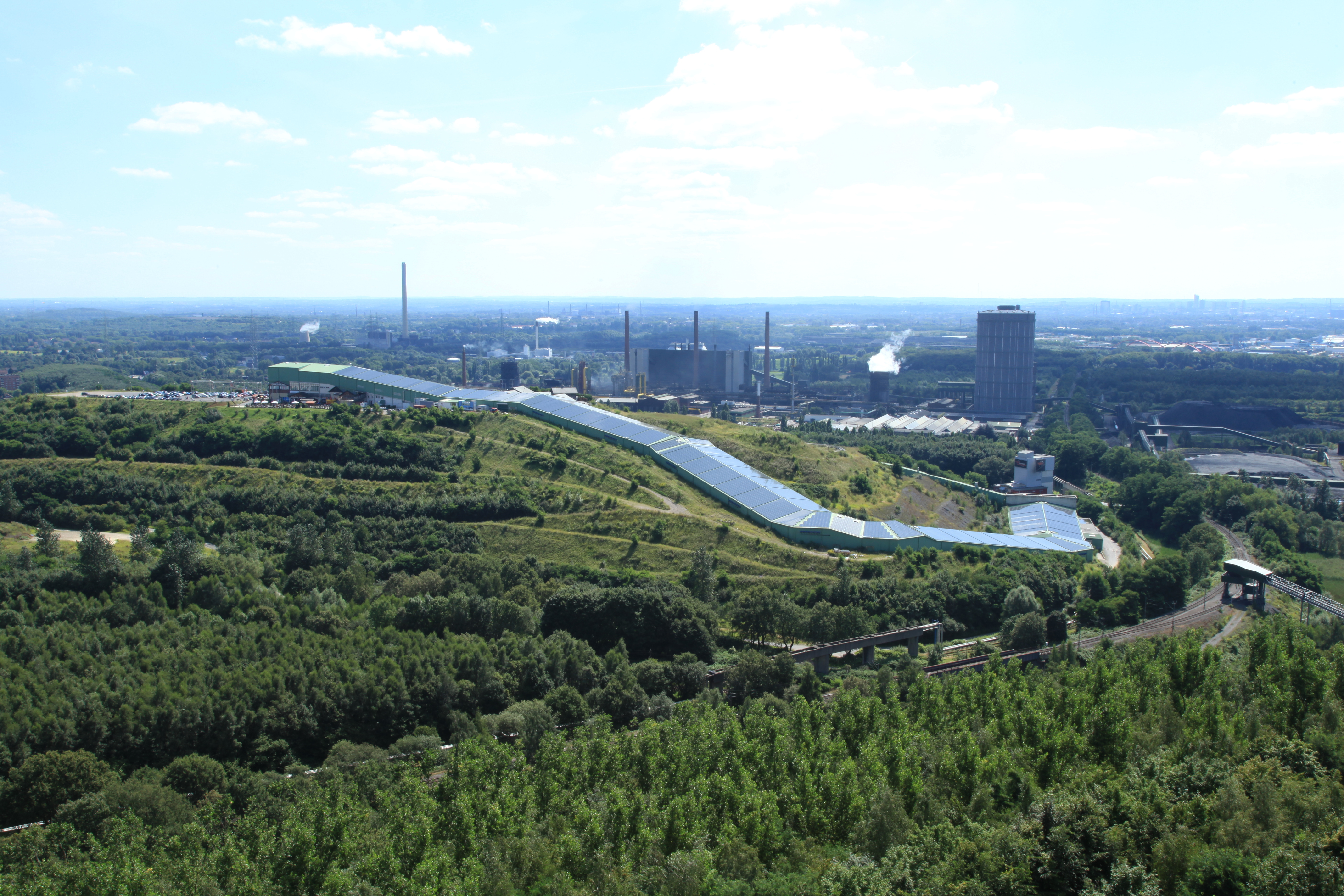 Blick vom Tetraeder auf Halde Prosperstraße mit und Kokerei Prosper in Bottrop